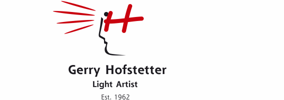 Logo GerryHofstetter Light Artist